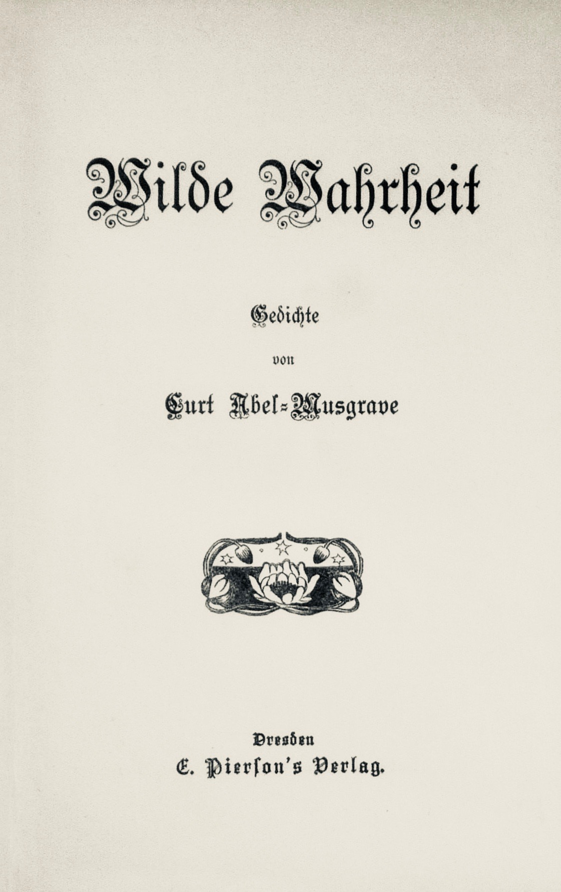 Curt Abel-Musgrave: boek titel Wilde Waarheid (gedichten), gepubliceerd 1908